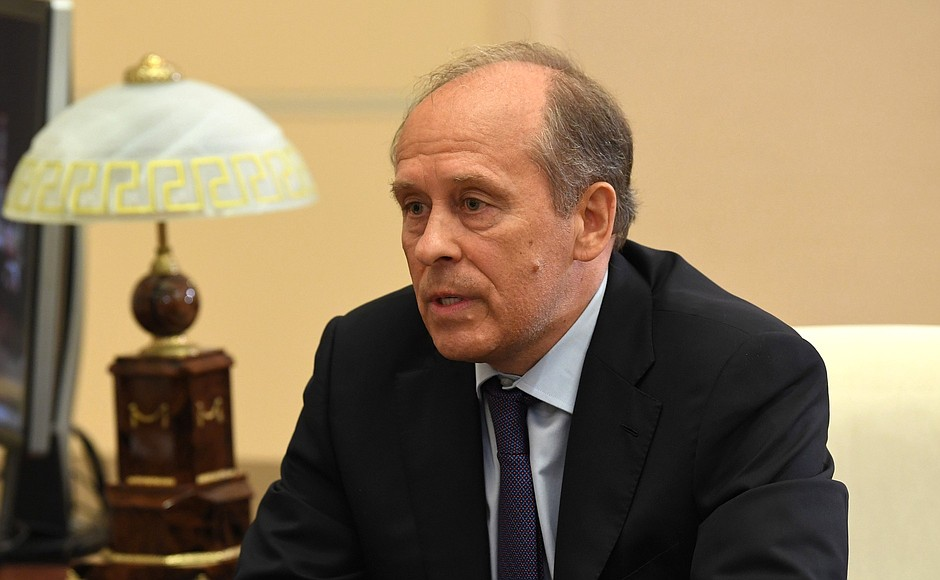 Директор Федеральной службы безопасности Александр Бортников.